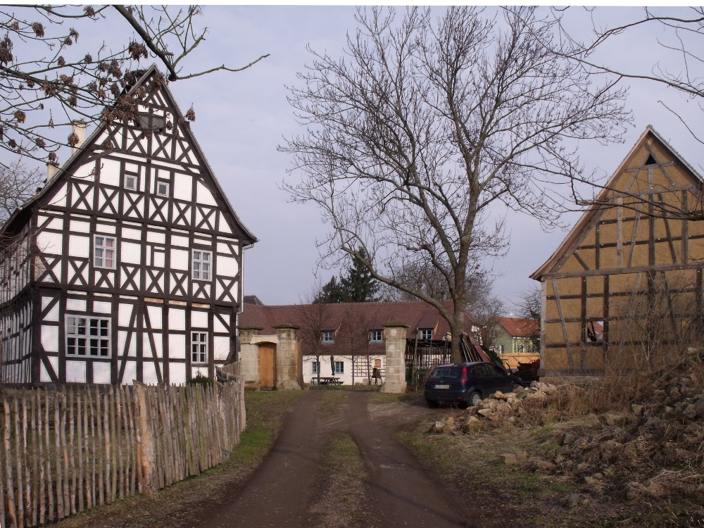 Sattelhof in Zwenkau bei Leipzig